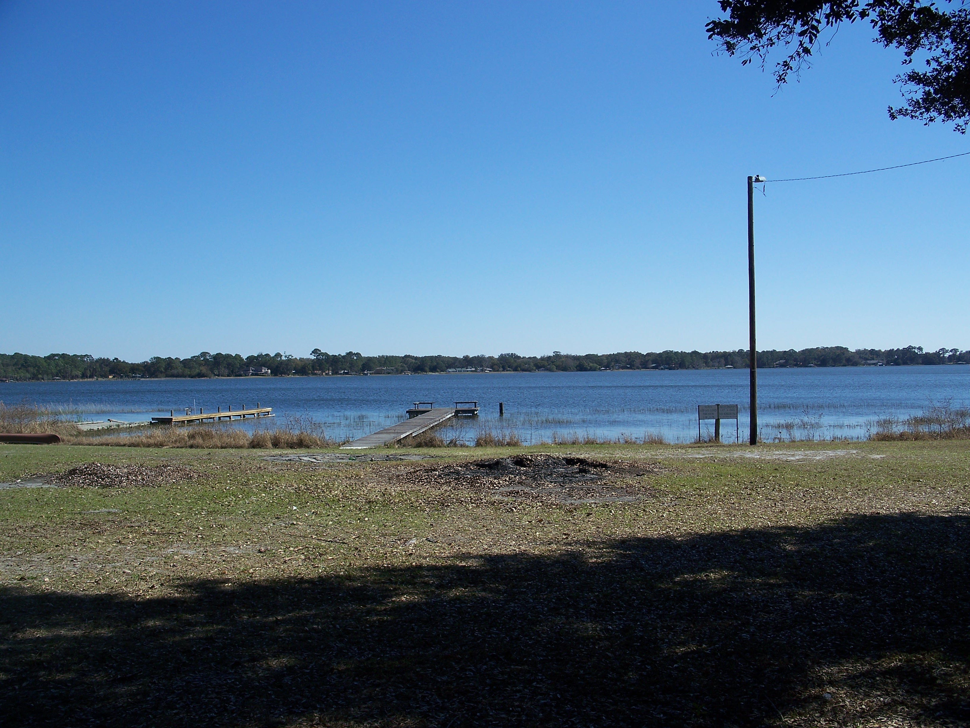 Eustis, Florida: Lake Joanna